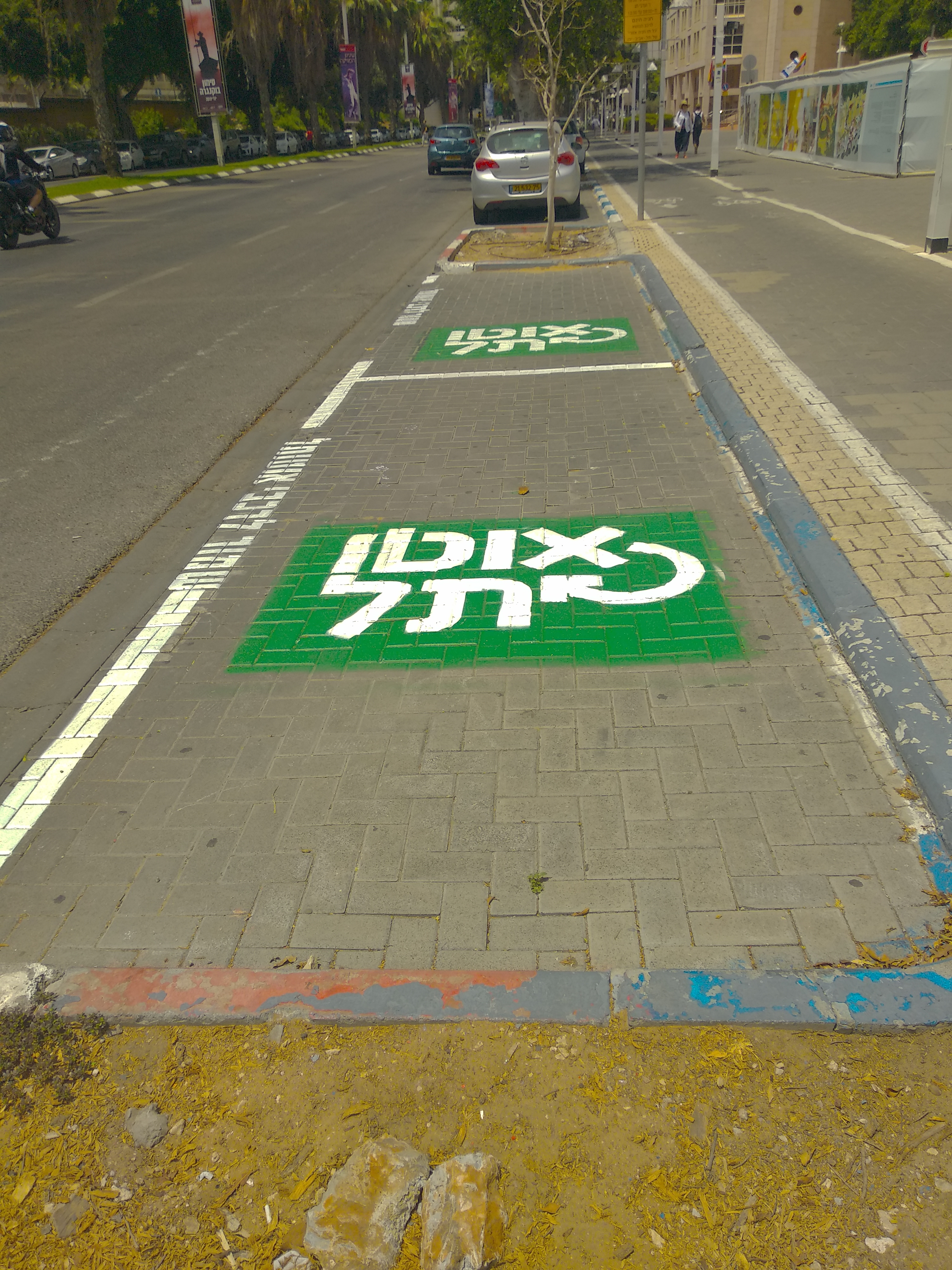 מקום חניה שמור למכוניות "אוטו-תל", בשדרות שאול המלך בתל אביב